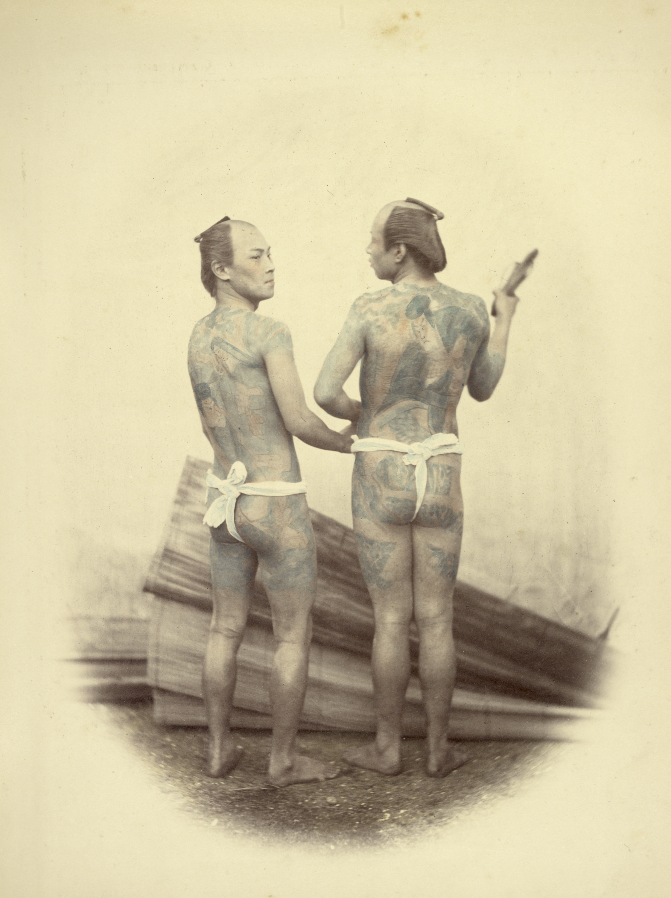 Mozos de cuadra, o caballerizos; Felice Beato (Inglés, nacido en Italia, 1832 - 1909); 1866–1867; Papel a la albúmina impregnado en solución de nitrato de plata y coloreado a mano; 28.1 × 21.1 cm; 84.XO.613.40; Sin derechos de autor en Estados Unidos (